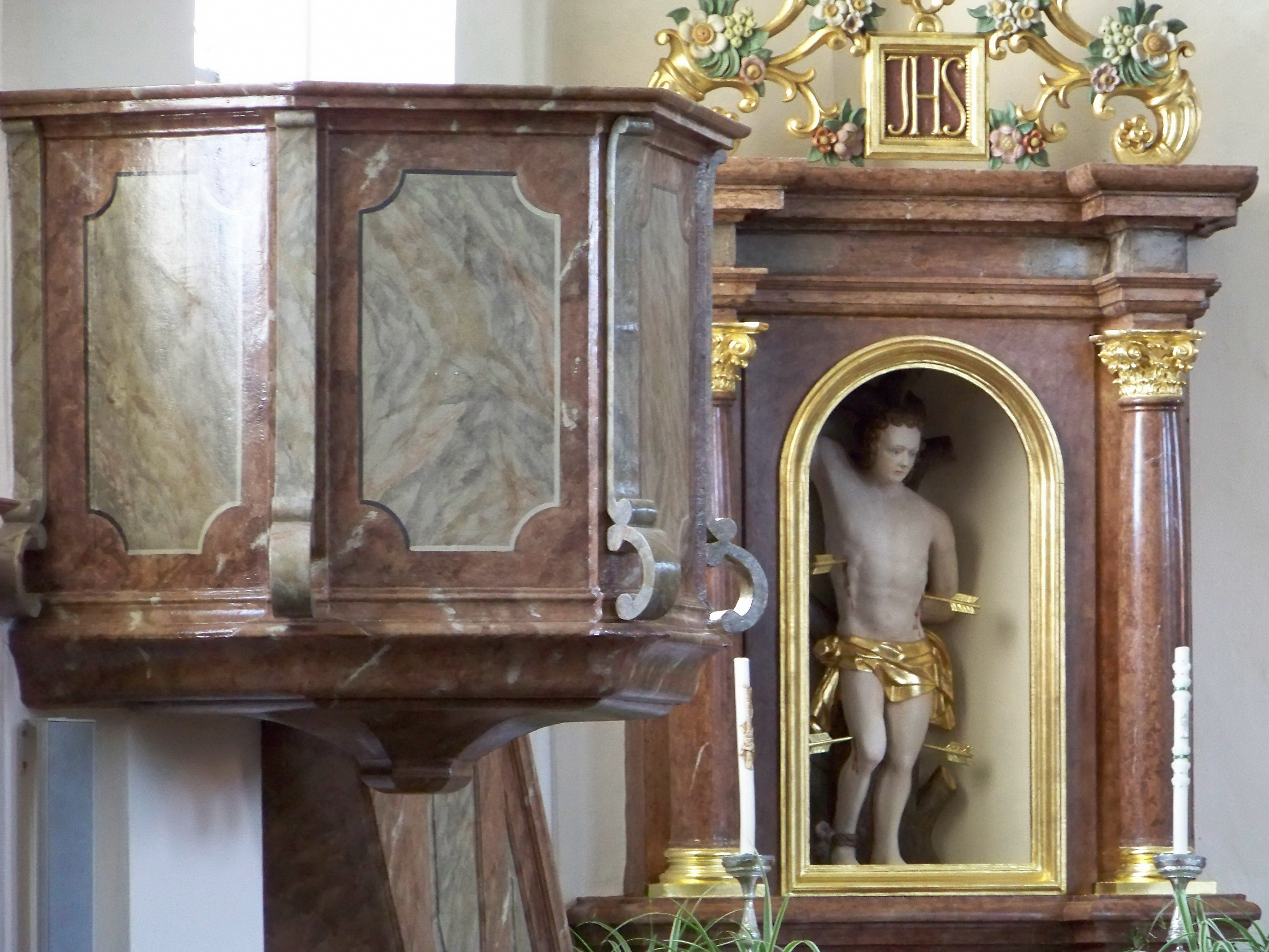 Neufahrn in Niederbayern. Hebramsdorf 5. Filialkirche St. Johannes der Täufer. Erbaut 1730, über älterem Kern; mit Ausstattung. St. Sebastian in einem Altarschrein. Davor polygonale Kanzel.